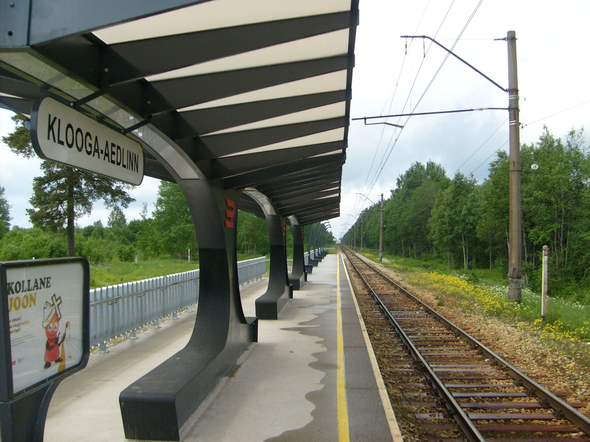 Klooga-Aedlinna raudteepeatus.